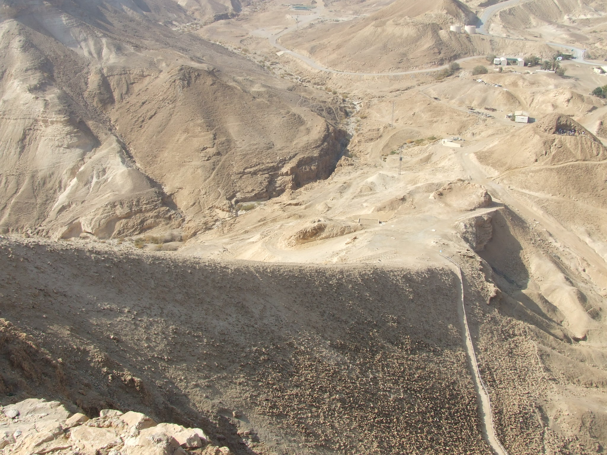 Masada, Israel (tag added by Kordas)